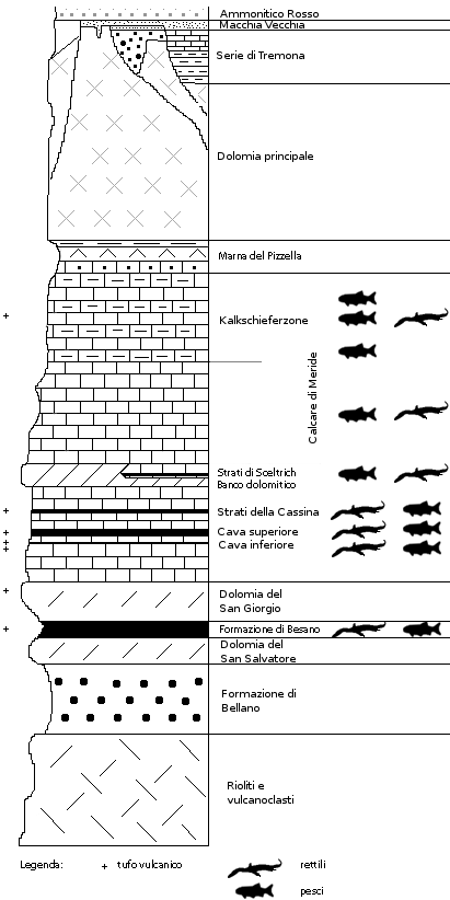 Litostratigrafia del Monte San Giorgio